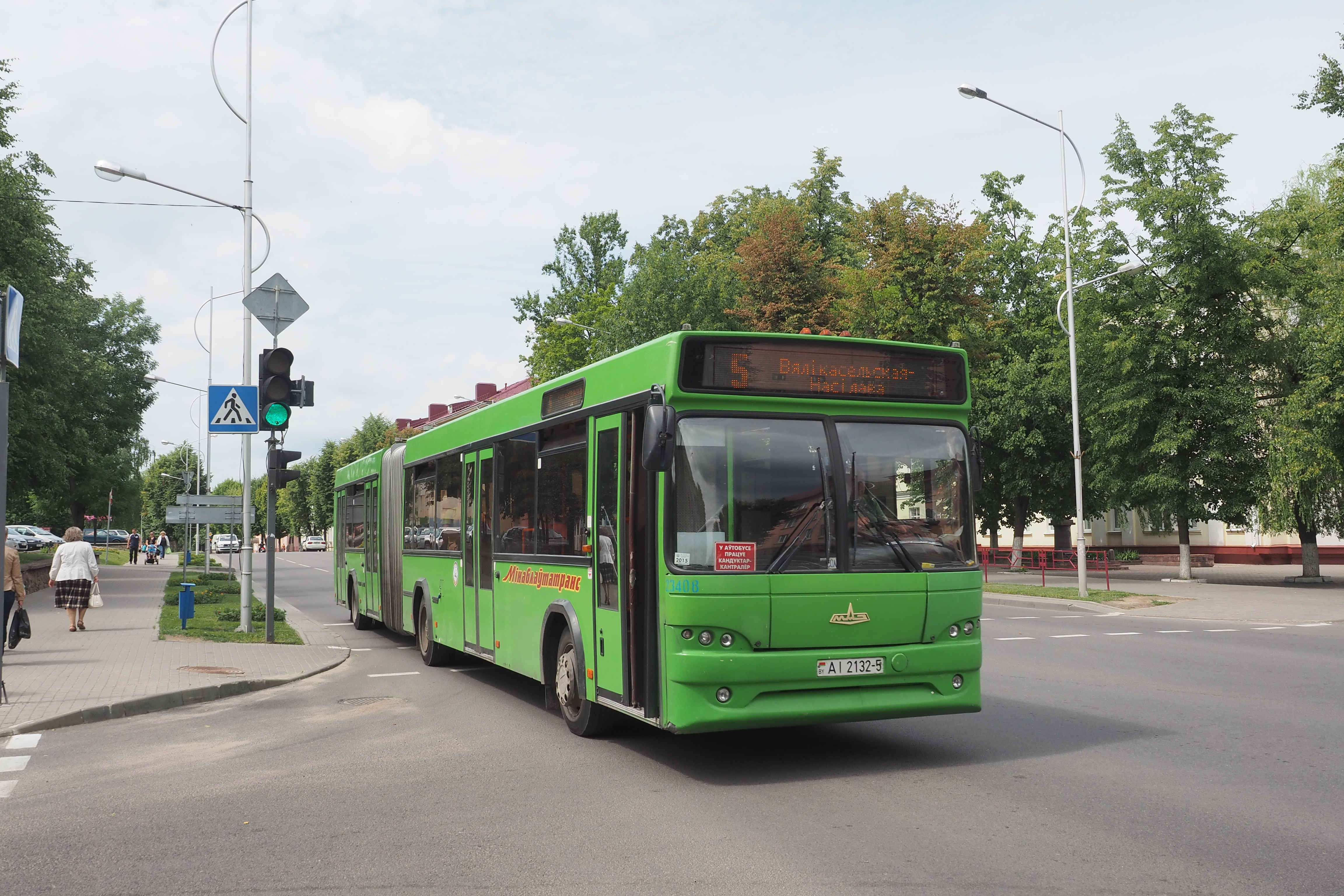 Maladzyechna, Belarus